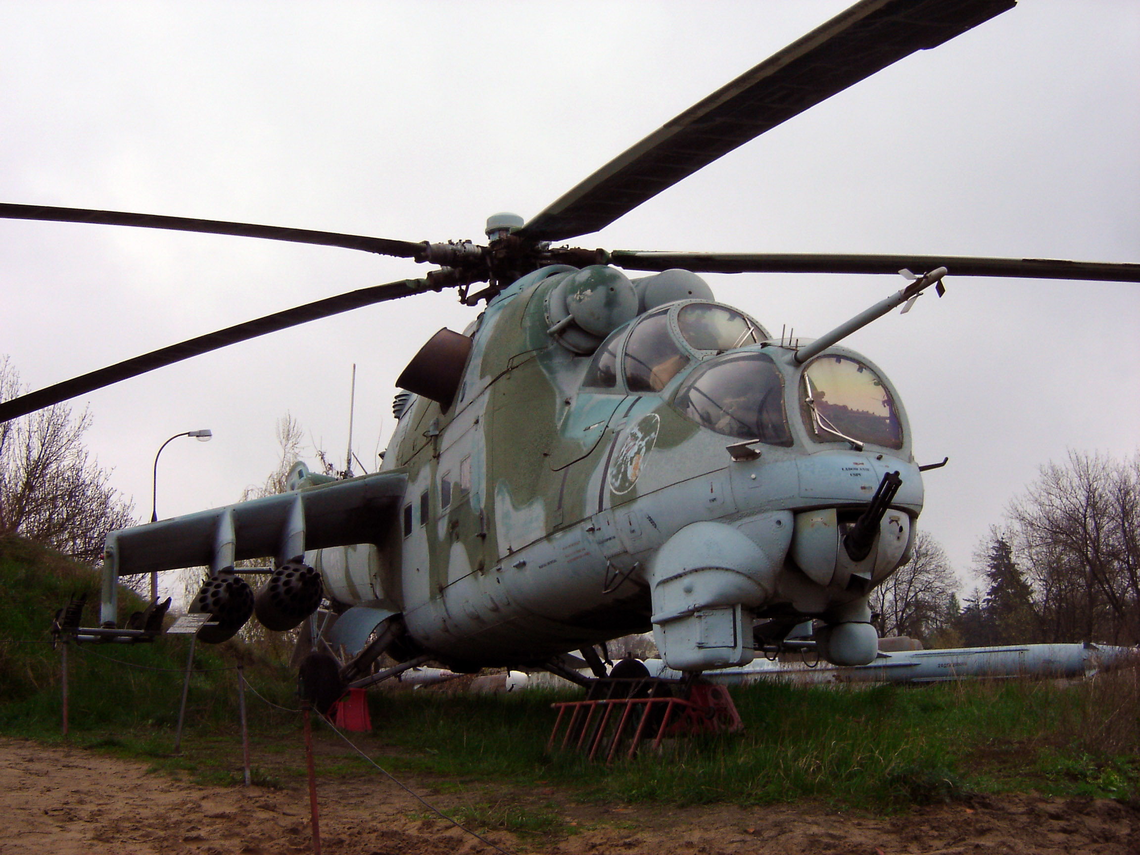 Śmigłowiec Mi-24D ZSRR